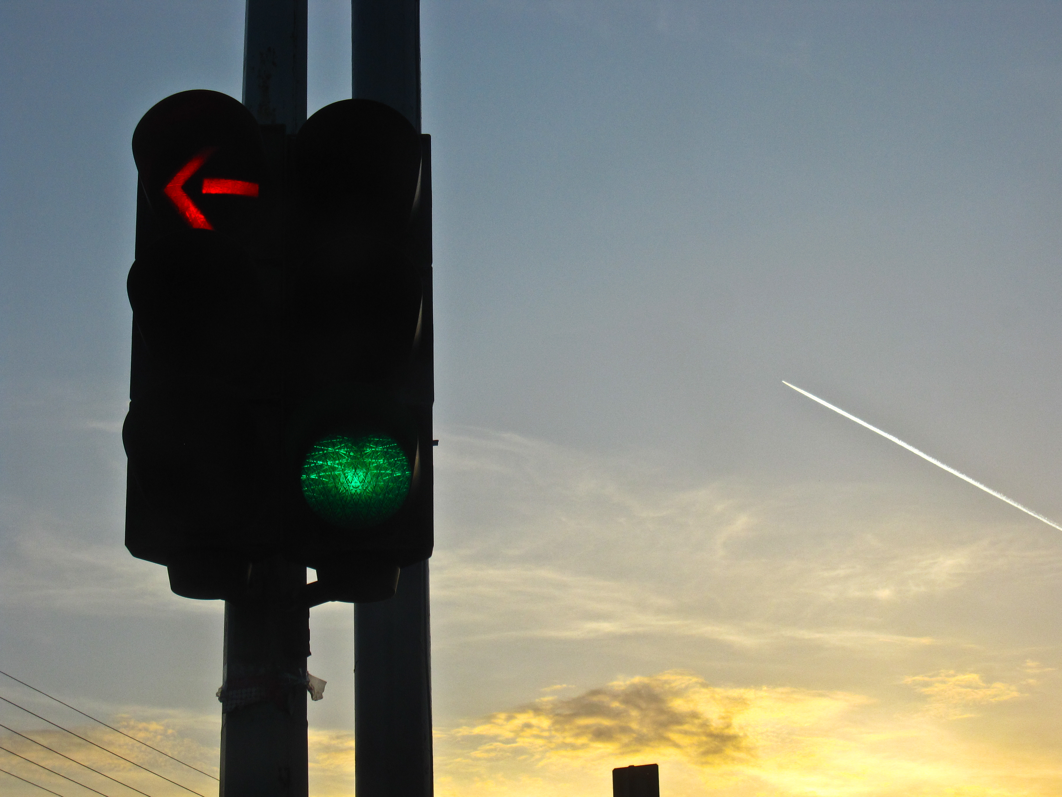 Φωτεινός συματοδότης για την ρύθμηση της οδικής κυκλοφορίας